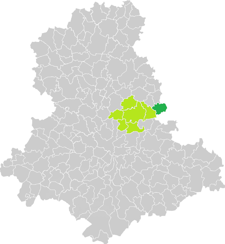 Carte de situation de la commune des Billanges (en vert foncé) dans le votre Canton (en vert clair) sur une carte des communes de la Haute-Vienne